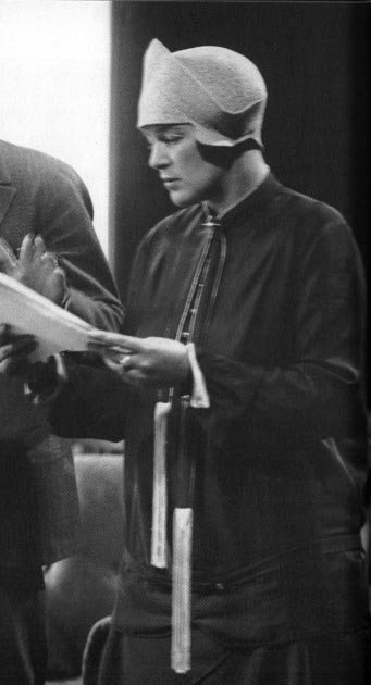 Märta Ekström